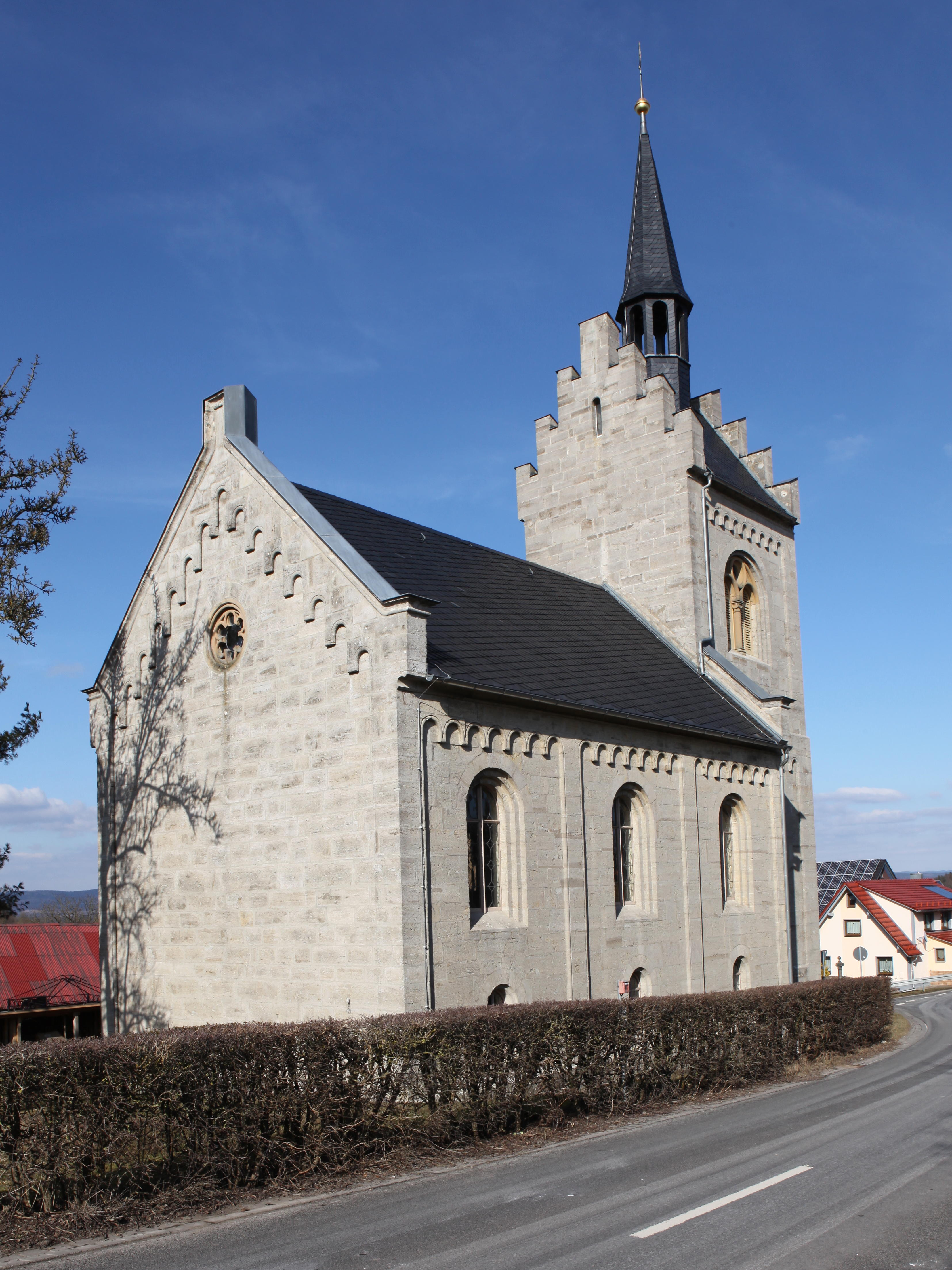 Evangelisch-Lutherische Kirche St. Johannes in Wachenbrunn, OT von Themar, Landkreis Hildburghausen